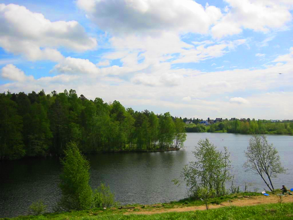 1-е Ждановское озеро